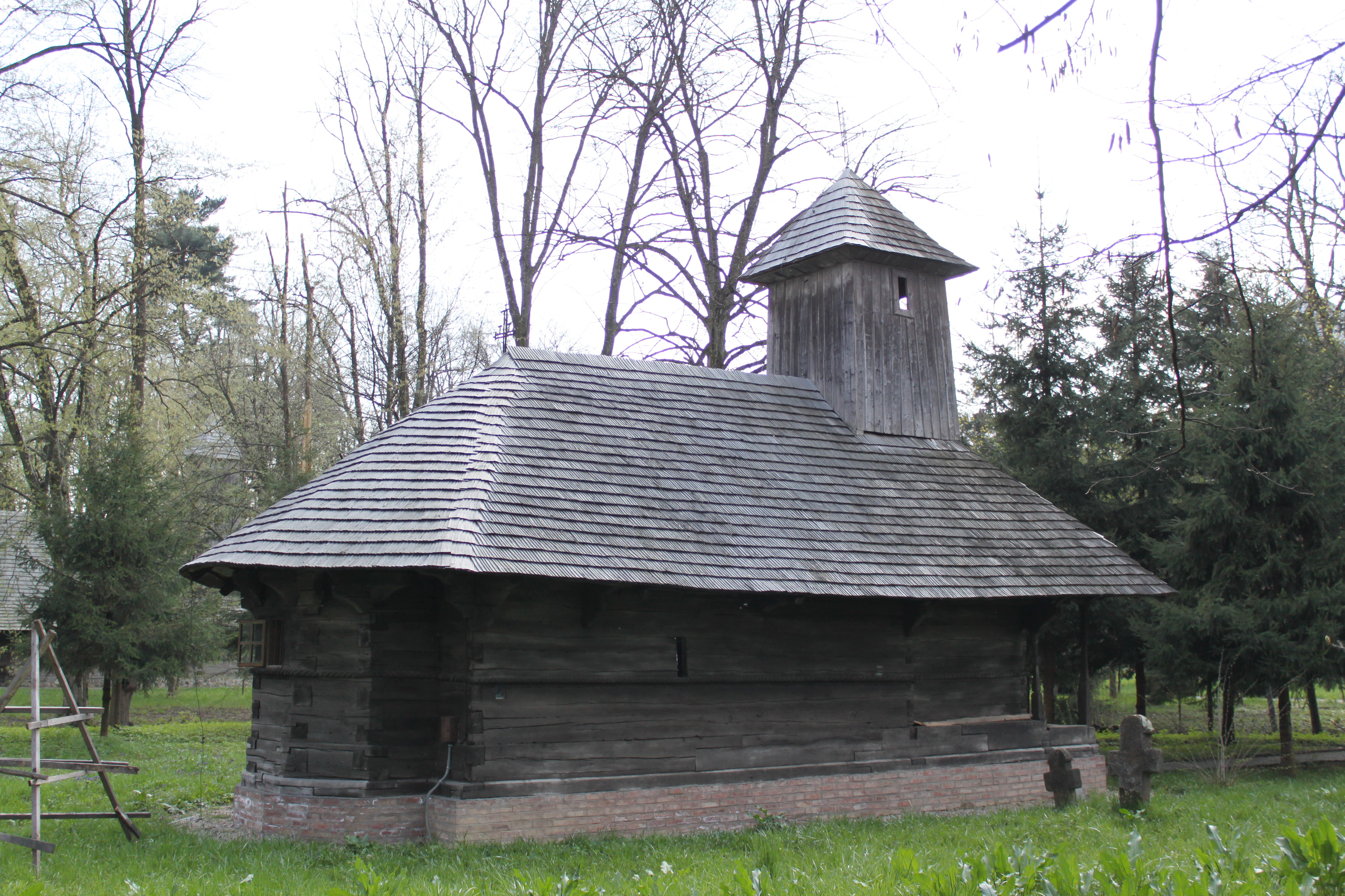 Biserica de lemn din Drăganu-Olteni, judeţul Argeş.